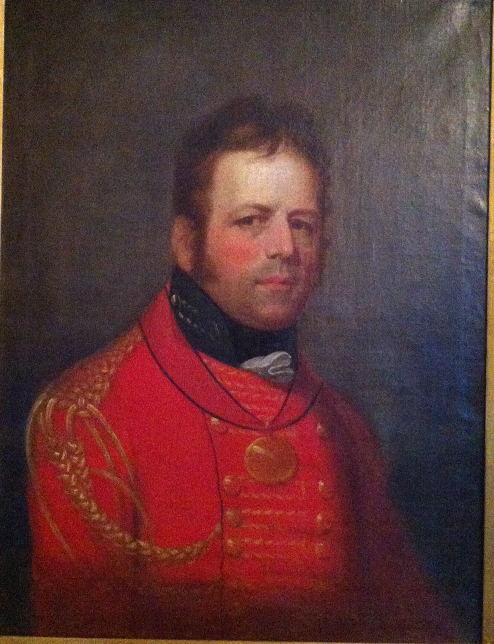 Lieutenant General Sir George Prevost, Bt